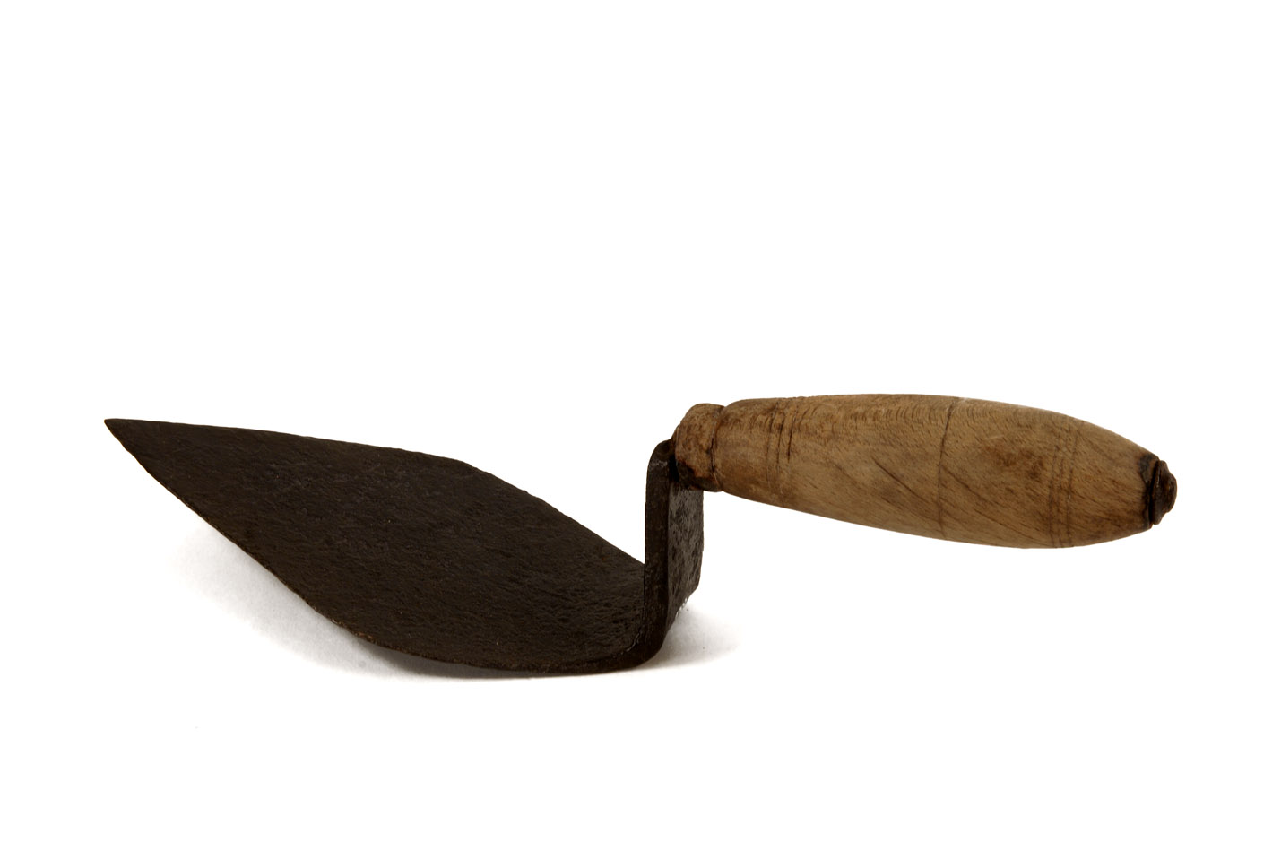 Fotografies dels objectes de l'exposició permanent de la sala "Secà i Muntanya" del Museu Valencià d'Etnologia - Fotografies de Mateo Gamon. Palustre per a plantar creïlles, cebes, etc...